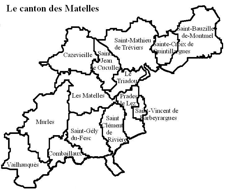 Le canton des matelles Image personnelle